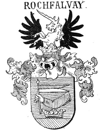 A Rochfalvay család címere